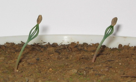 three day old Pinus halepensis. Drei Tage alte Seekiefer (Aleppokiefer).